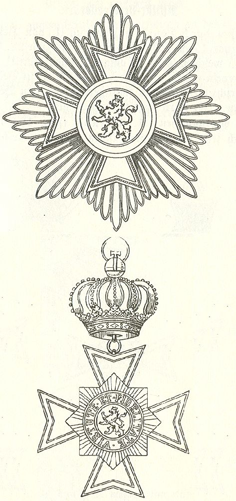 Scan van Blz. 145 van het boek "Handbuch der Ritter- und Verdienstorden " uitgegeven 1893 door Weber.Tekening van de in 1902 overleden Maximilian Gritzner. Robert Prummel 10 jul 2008 16:40 (CEST)